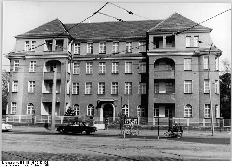 Berlin, Vietnamesische Botschaft ADN-ZB Schneider 3.1.87-Qua-Berlin: Botschaft der Sozialistischen Republik Vietnam in der Dunckerstraße 125.